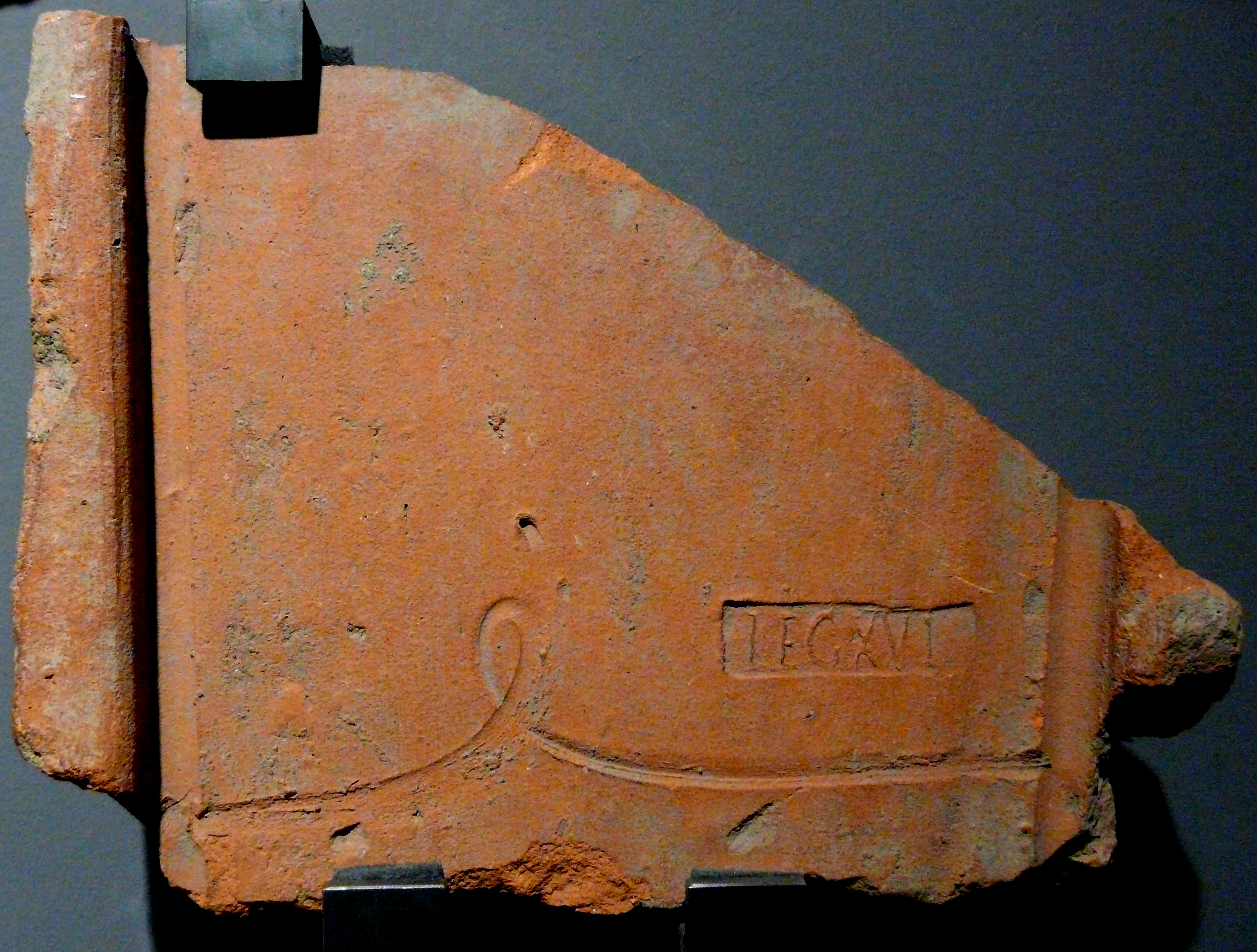 Dachziegel mit Stempel „LEG(io) XVI“, aus Novaesium, Clemens-Sels-Museum, Neuss AE 1905, 134